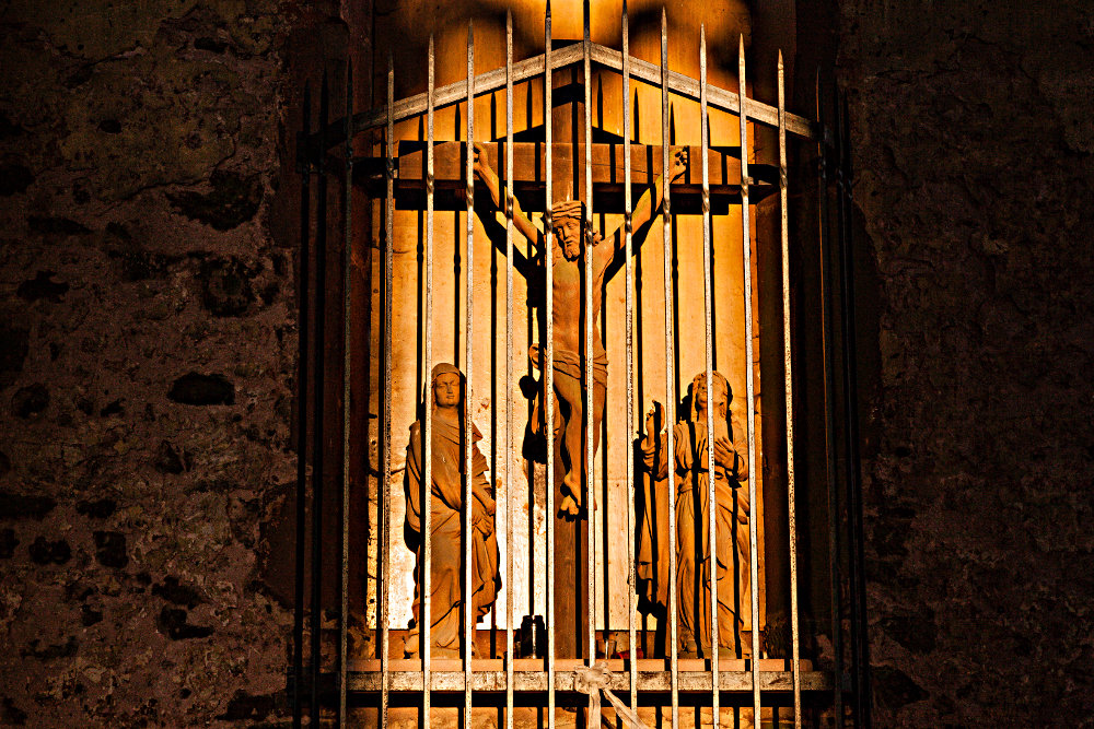 Gotthardruine in Weilbach (Bayern), Kreuzigungsgruppe im Chor